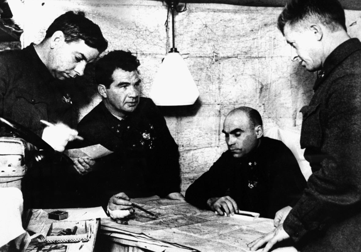 Командный пункт 62-й армии. Слева направо: начальник штаба армии генерал-майор Н.И. Крылов, командующий армией генерал-лейтенант В.И. Чуйков, член Военного совета генерал-лейтенант К.А. Гуров, командир 13-й гвардейской дивизии генерал-майор А.И. Родимцев.